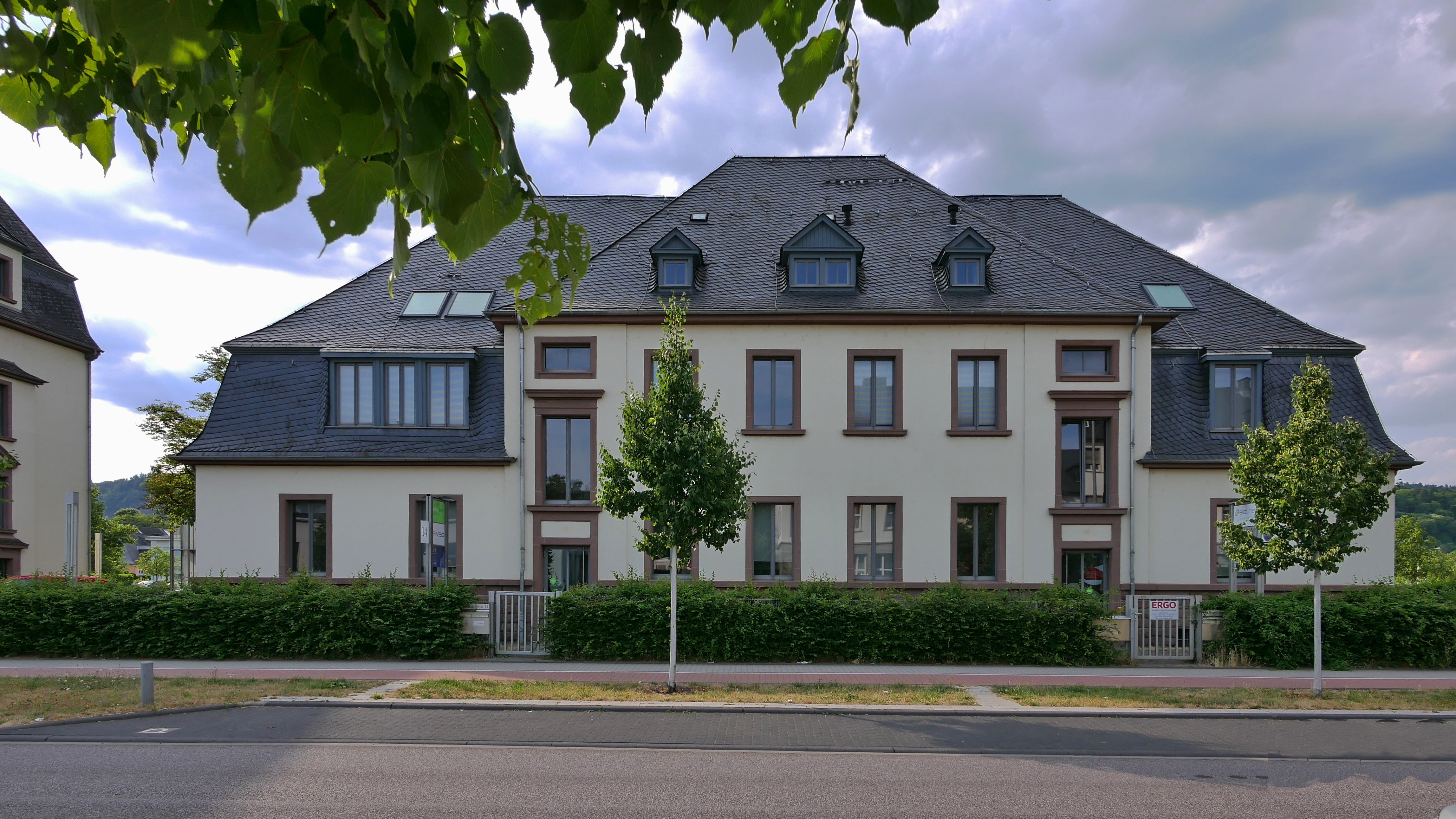 Trier :ehemalige Jaegerkaserne HerzogenbuscherStrasse 10 jetzt von Medien- und Technologieunternehmen